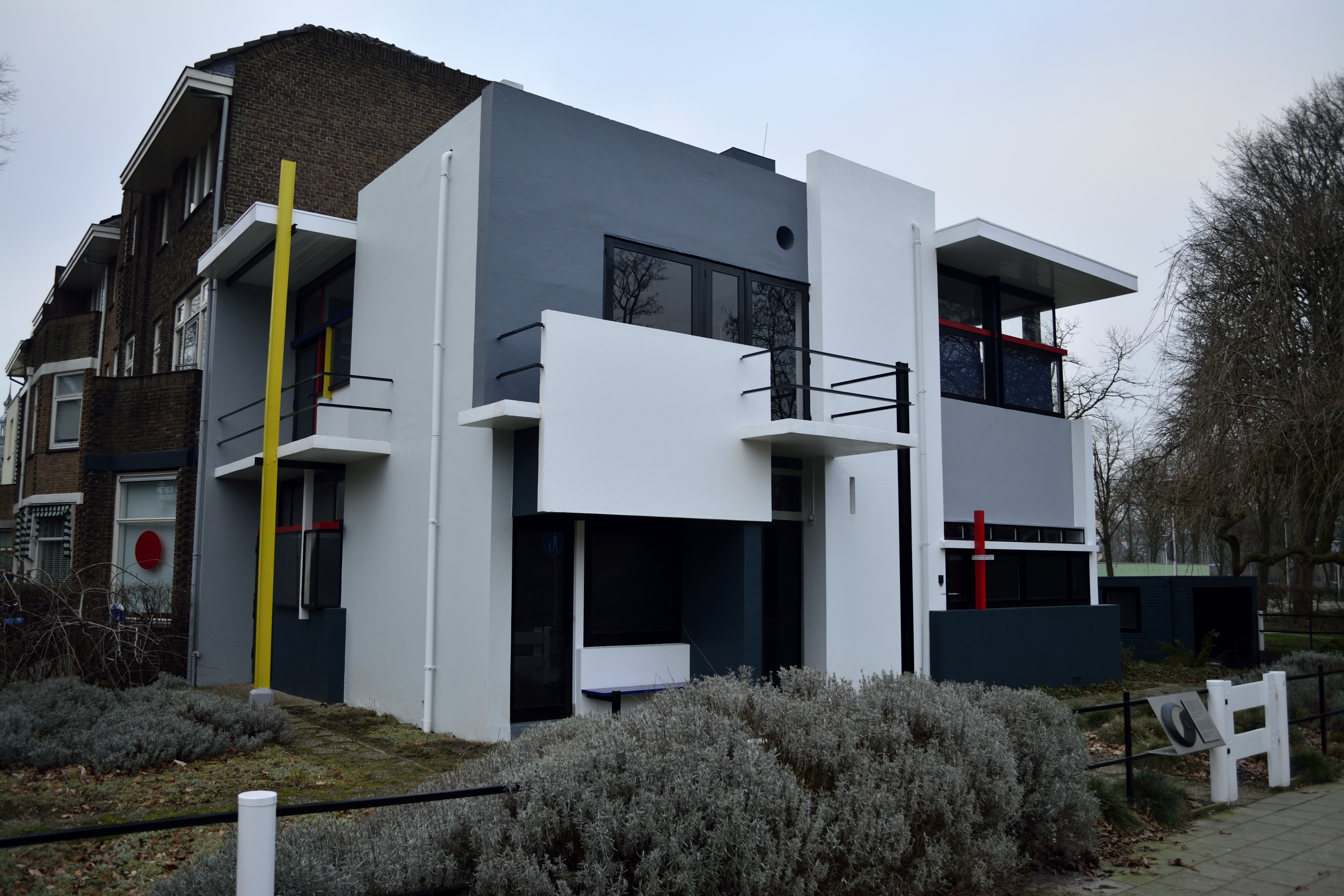 image of the house in winter